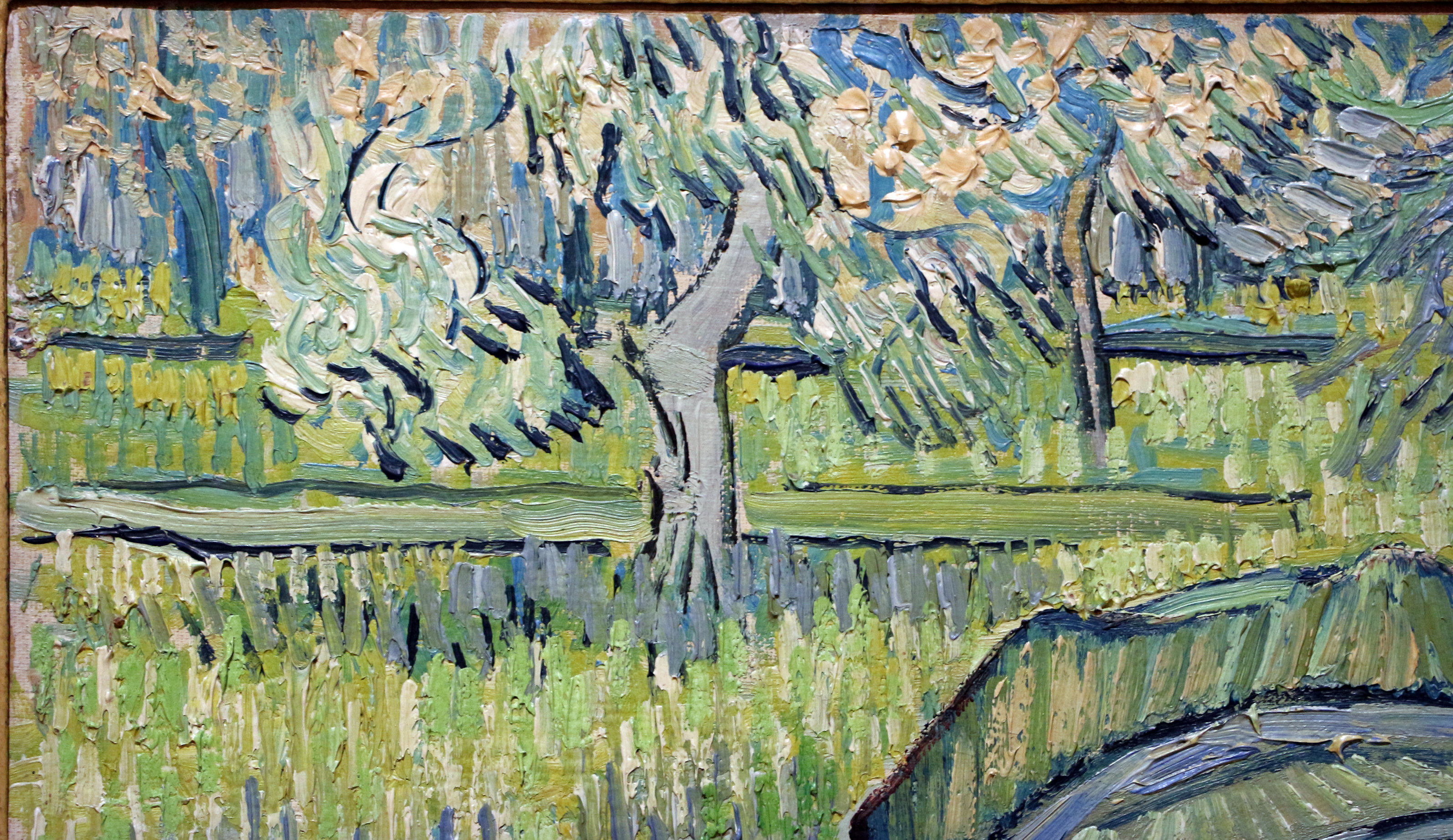 Paintings in the Galleria nazionale d'arte moderna (Rome) This is a photo of a monument which is part of cultural heritage of Italy.